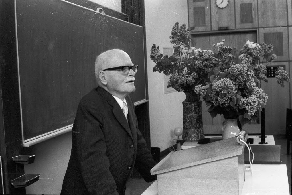 Hochschullehrer und ehemaliger Direktor des Geologisch-Paläontologischen Instituts und Museums der Christian-Albrechts-Universität (CAU) wird anlässlich seines 85. Geburtstages am 21.04.1976 nachträglich mit einem Festkolloquium geehrt.